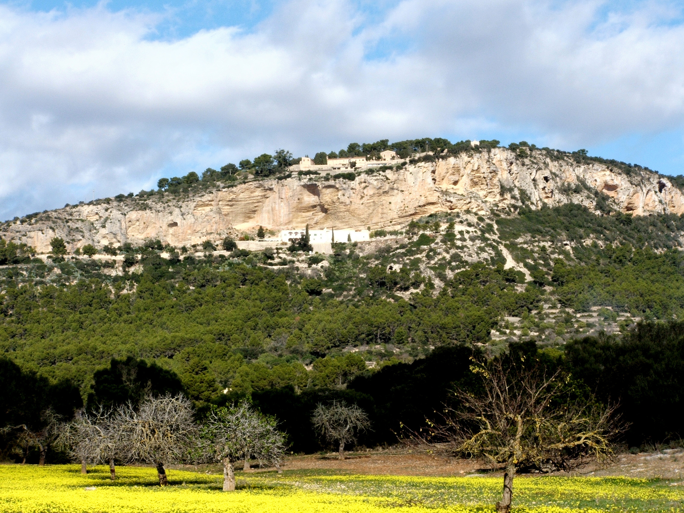 Monasteries at Puig de Randa